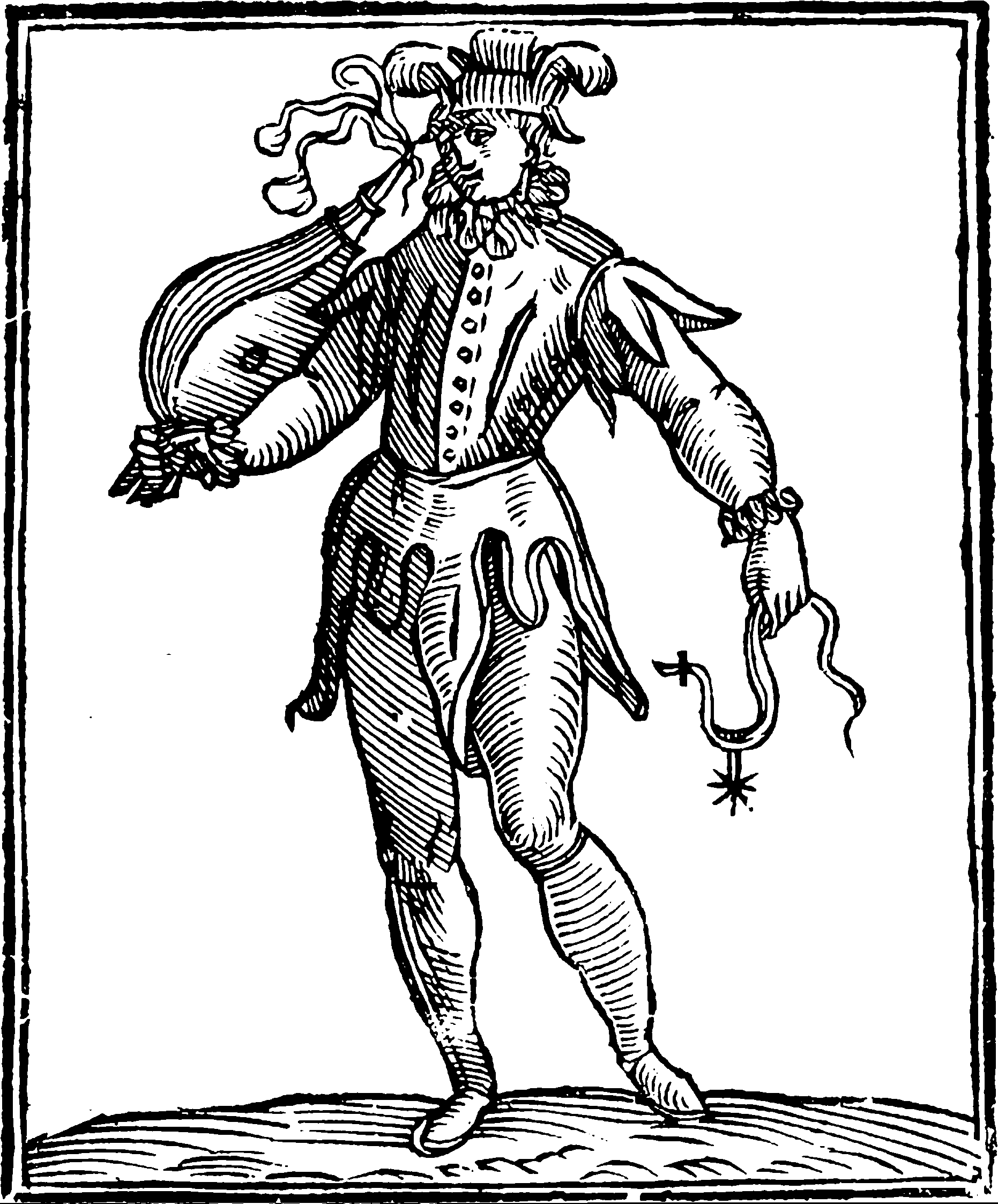 Raffigurazione del Capriccio nell'edizione di Tomasini, 1645, Venezia